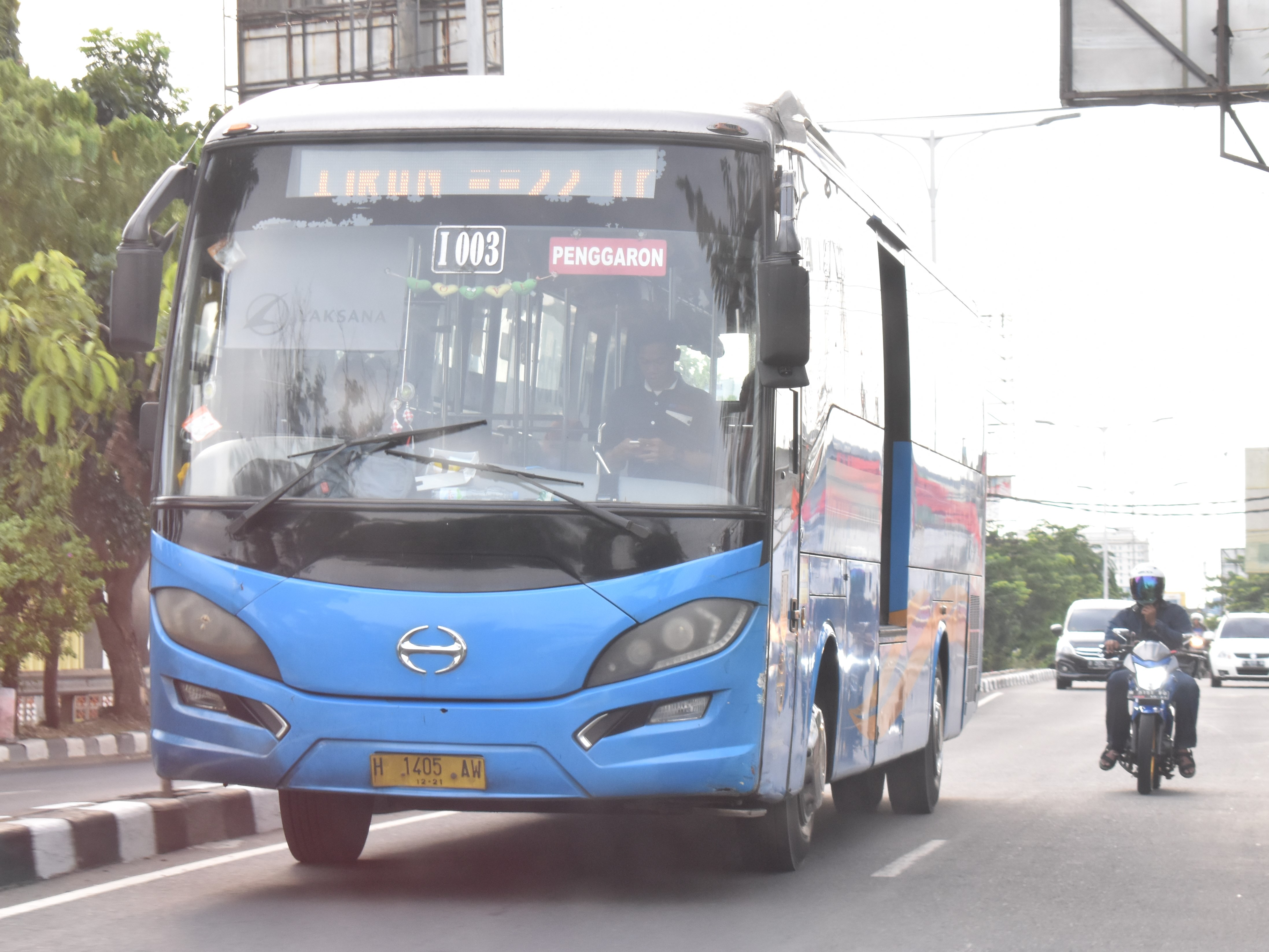 Koridor 1 - Discovery Trans Semarang Operated by PT Sembilan Sembilan Cahaya